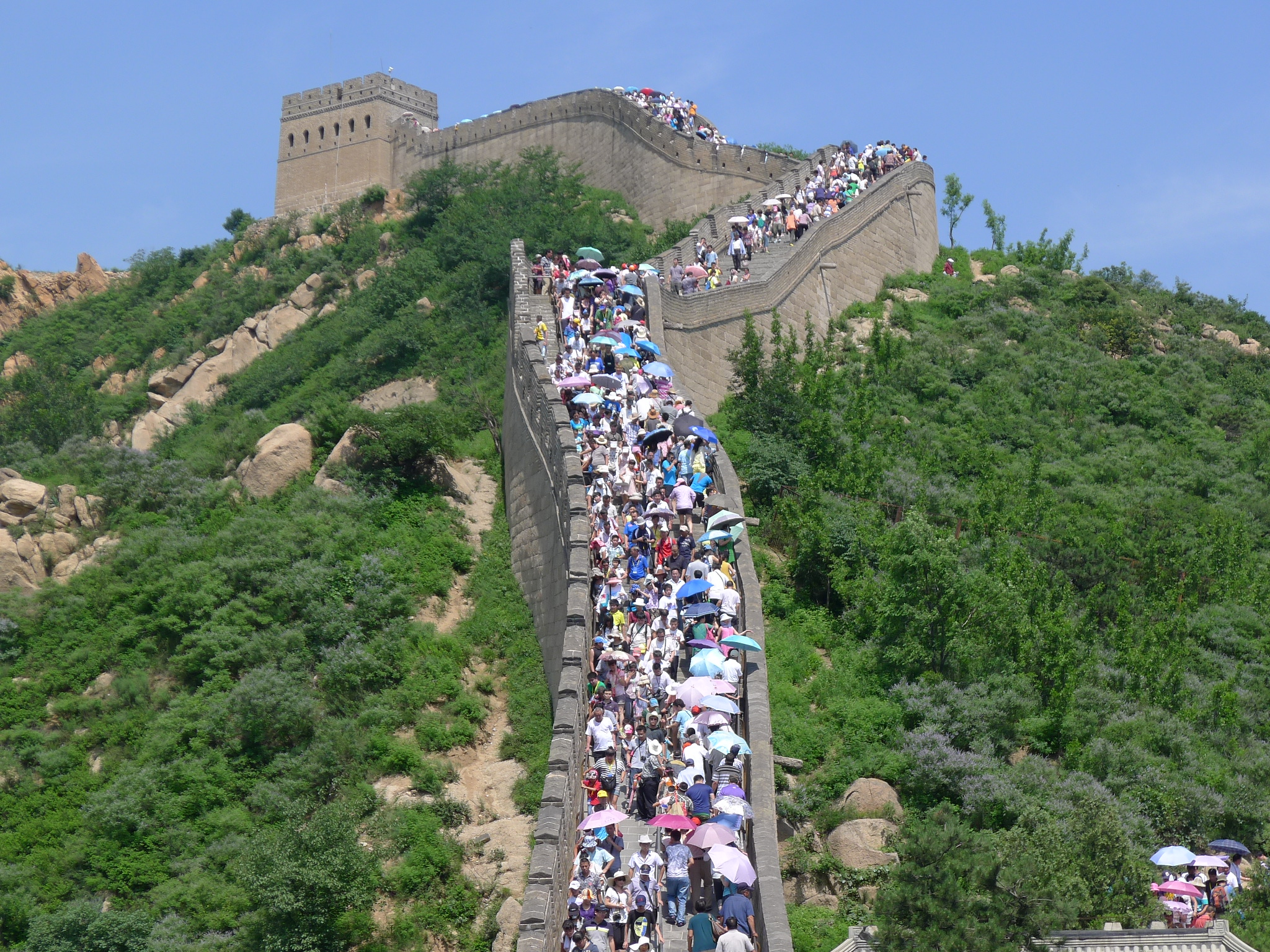 만리장성 (팔달령 정상)